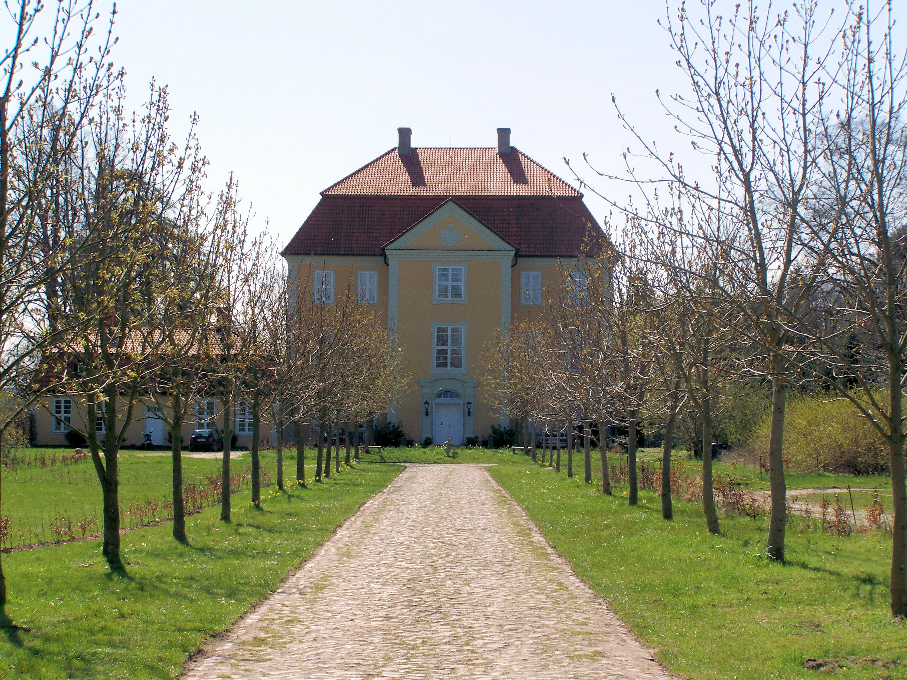 Quitzin, Jagdschloss (2008-04-20)